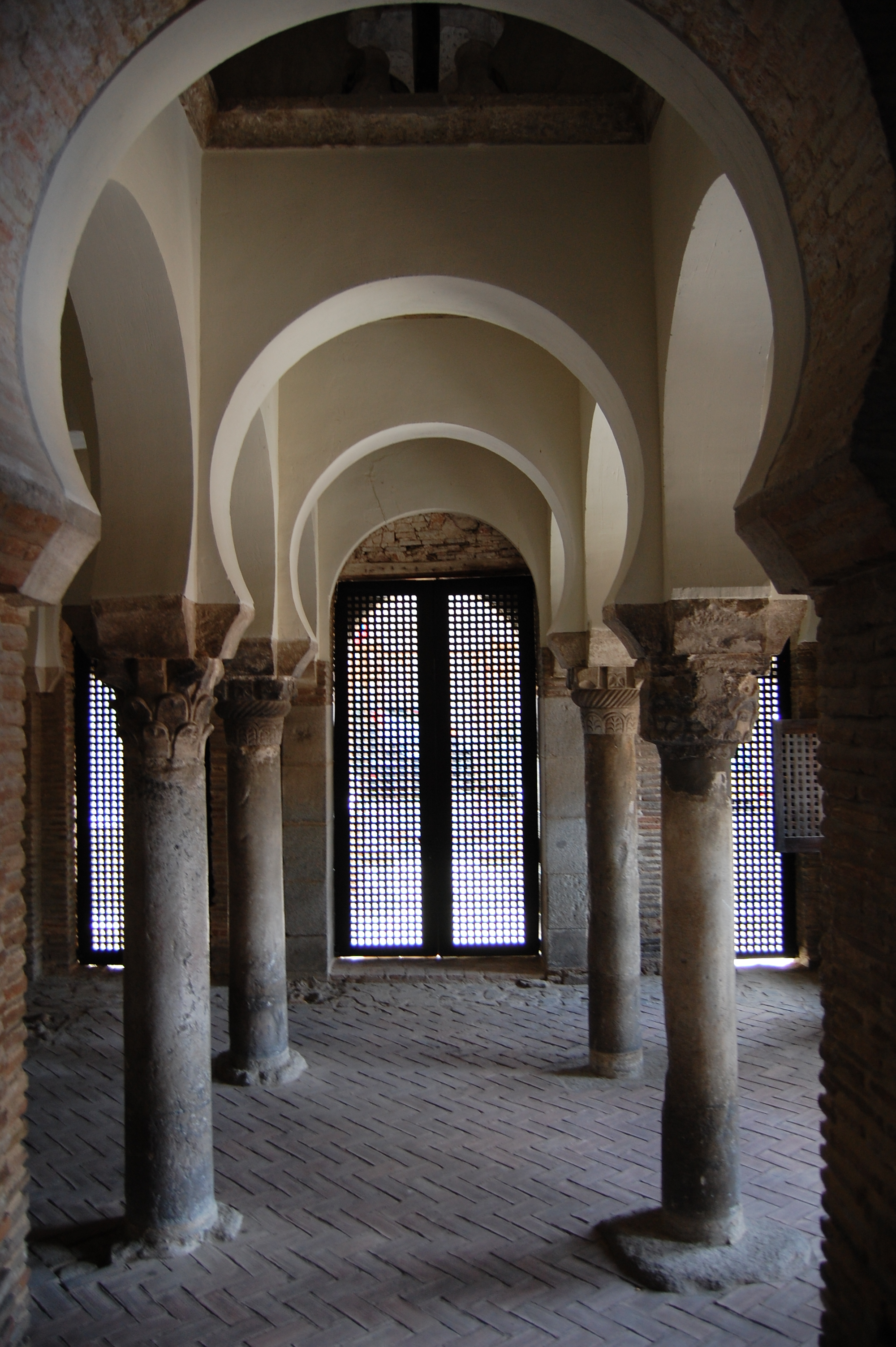 Antigua mezquita de Bab al Mardum. Iglesia del Cristo de la Luz, Toledo (España). Arte omeya de al-Andalus, año 999.